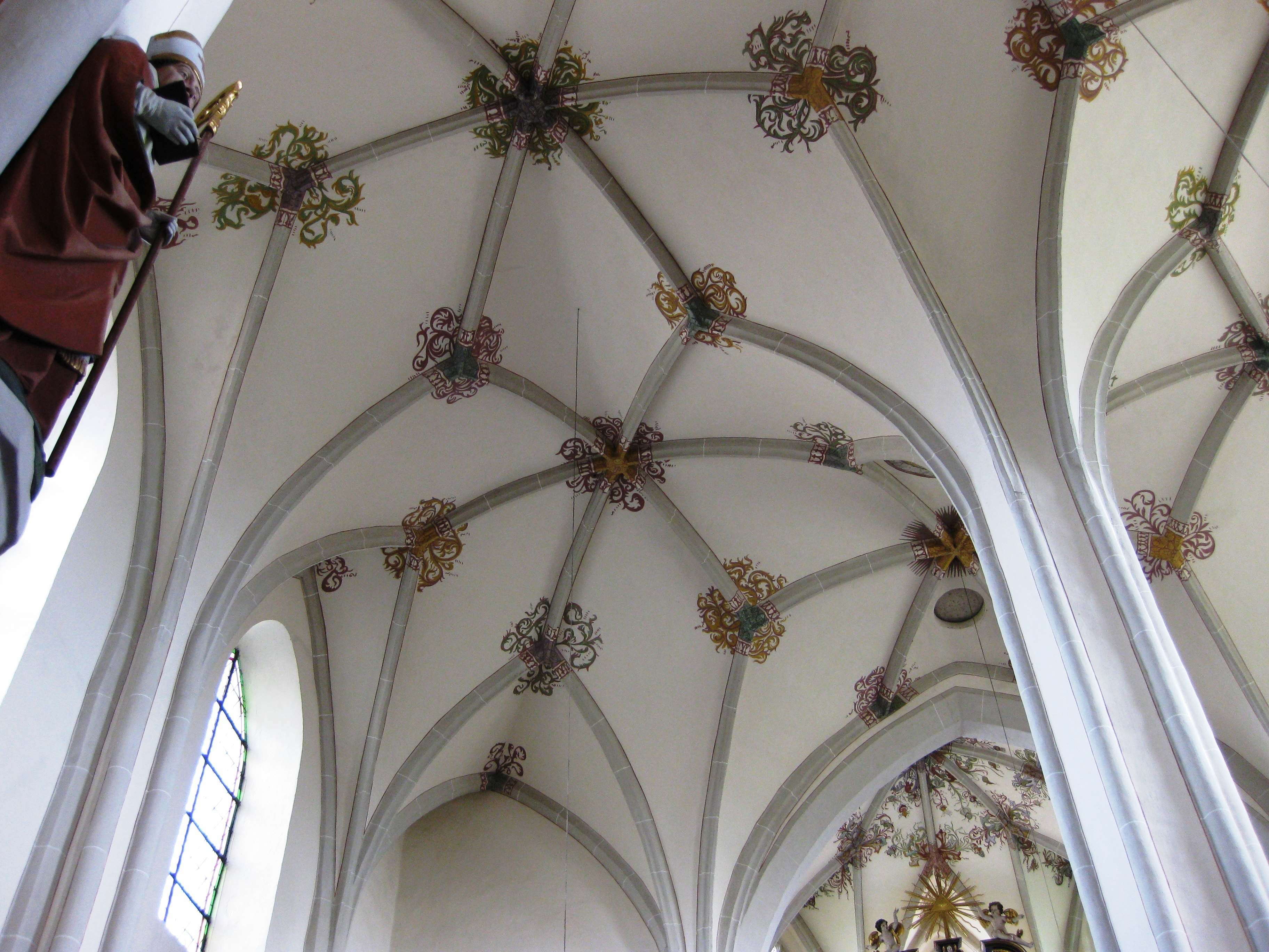 Sternrippengewölbe, 15. Jh